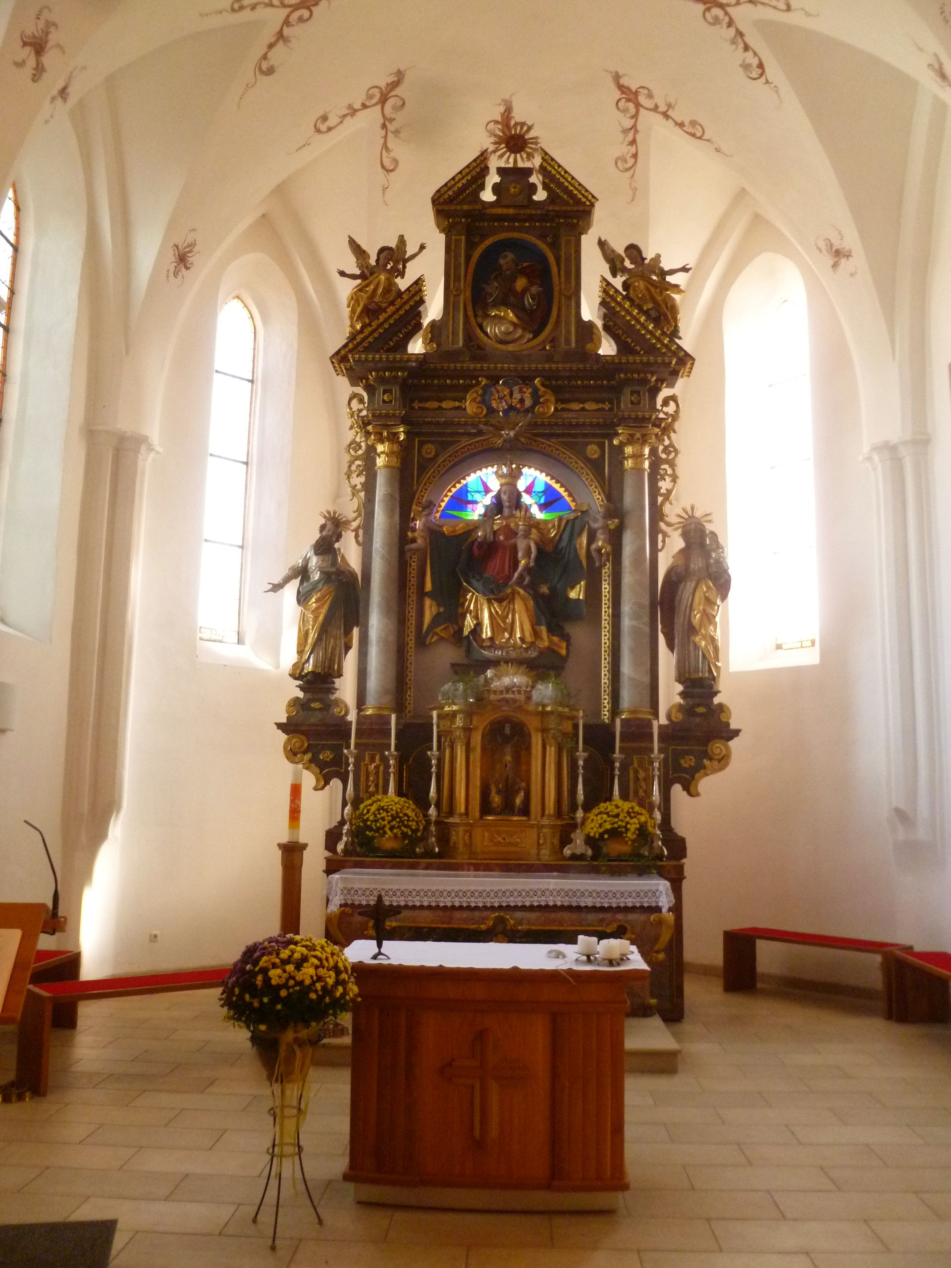 Kath. Pfarrkirche Mariä Himmelfahrt und Friedhof